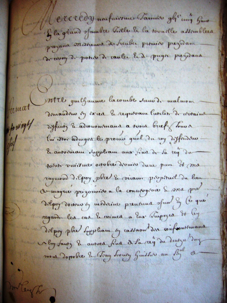 Erste Seite des Todesurteils vom 9. Januar 1658 gegen Raymond Delpoy